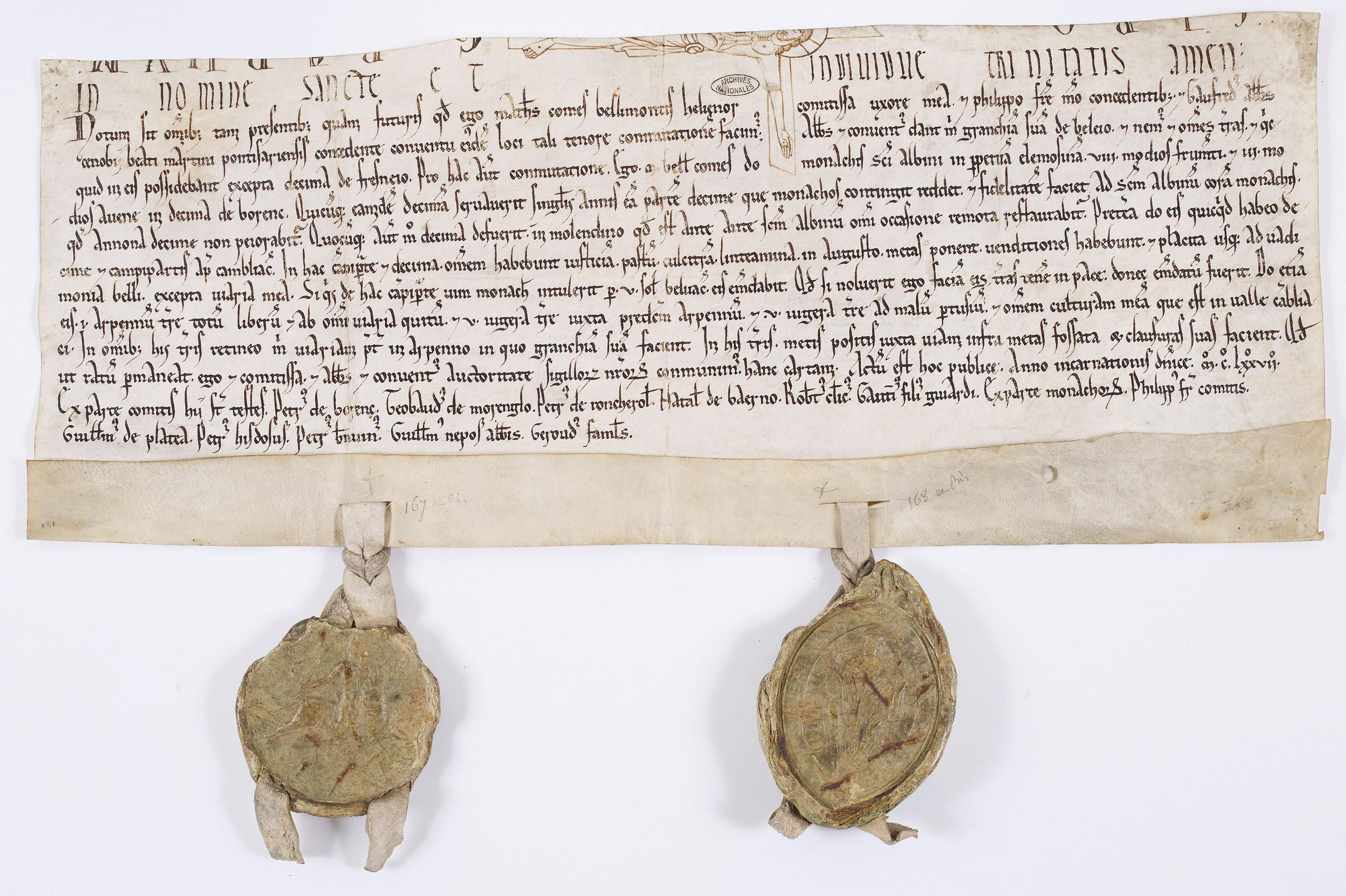 Matthieu III, comte de Beaumont-sur-Oise et sa femme, Eléonore de Vermandois, échangent des terres avec l'abbaye de Saint-Martin de Pontoise. Avec les terres échangées sont accordés aux moines la justice, le past ("pastum"), les couettes ("culcitram"), et les linceuls ("linteamina"). Grande charte en parchemin, rédigée en latin en 1177 et divisée en haut par un chirographe représentant le Christ en croix et scellée de deux sceaux en cire. L'autre moitié de l'acte est conservé aux Archives départementales du Val-d'Oise.